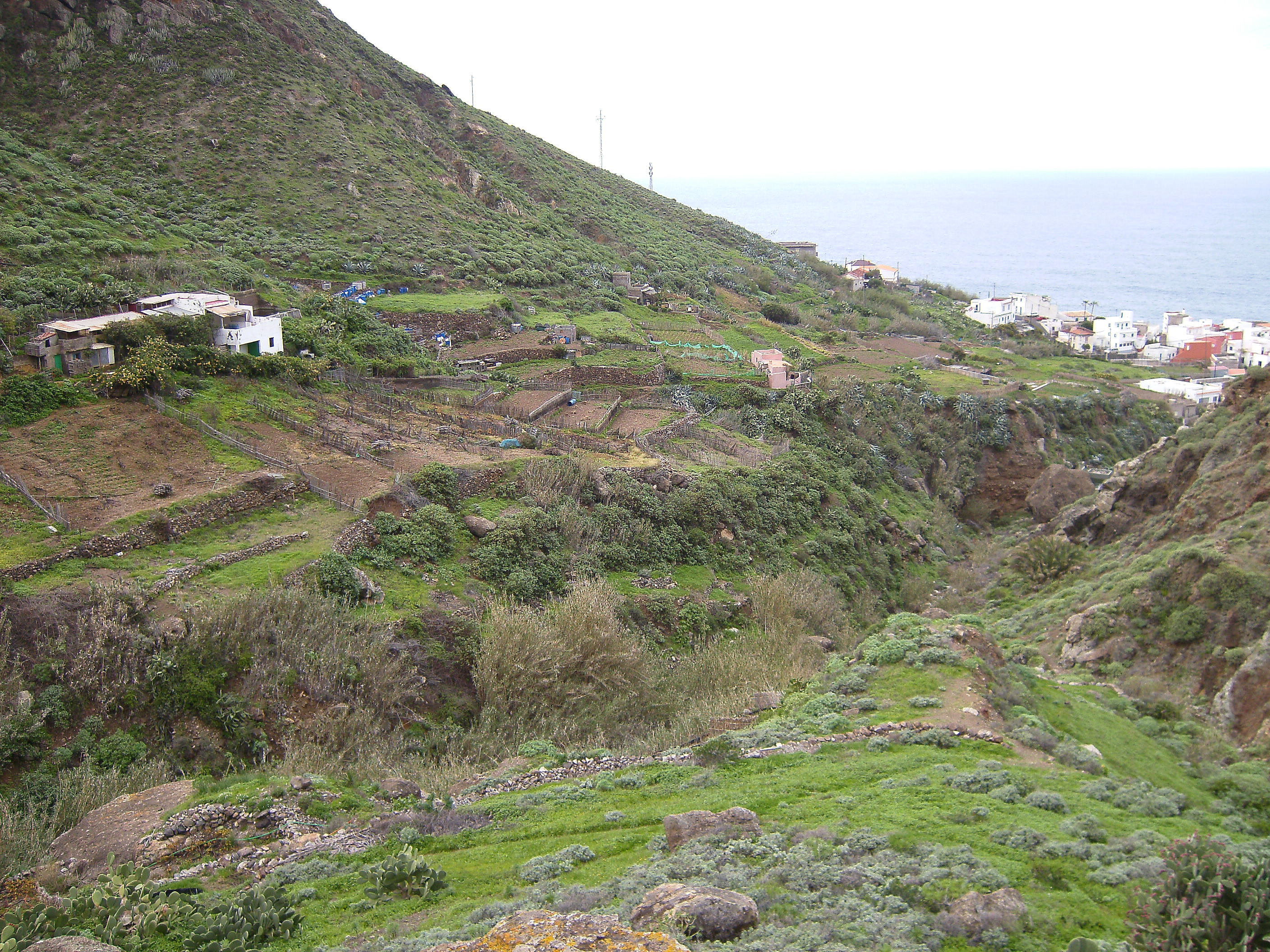 Tierras de cultivo en Almáciga, Anaga (Tenerife).